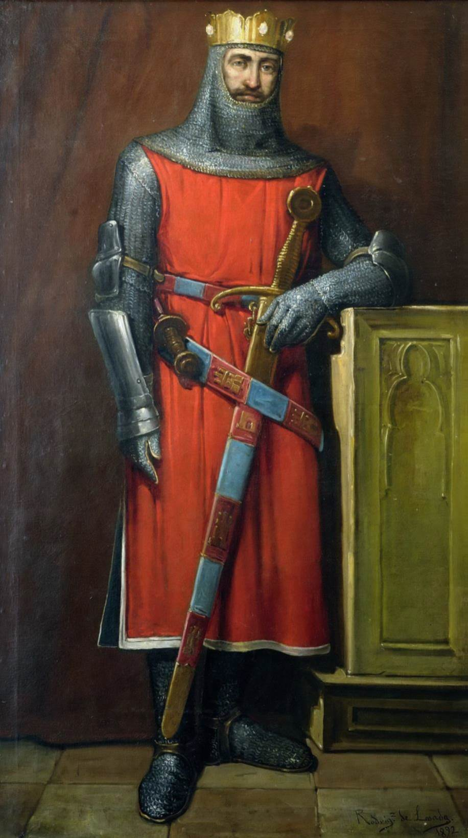 Retrato imaginario del rey Alfonso IX de León (1171-1230). Fue hijo del rey Fernando II de León y de la reina Urraca de Portugal. A lo largo de su reinado tuvo numerosos conflictos y tensiones con su primo Alfonso VIII de Castilla. Debido a estos, estuvo ausente en la batalla de las Navas de Tolosa, librada en 1212, pese a lo cual realizó una gran actividad de reconquista, recuperando para la Cristiandad las ciudades de Cáceres, Mérida y Badajoz, y en general toda la mitad oeste de la actual Comunidad Autónoma de Extremadura.